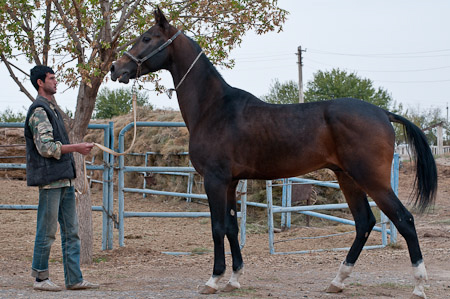 Studfarm in Turkmenistan